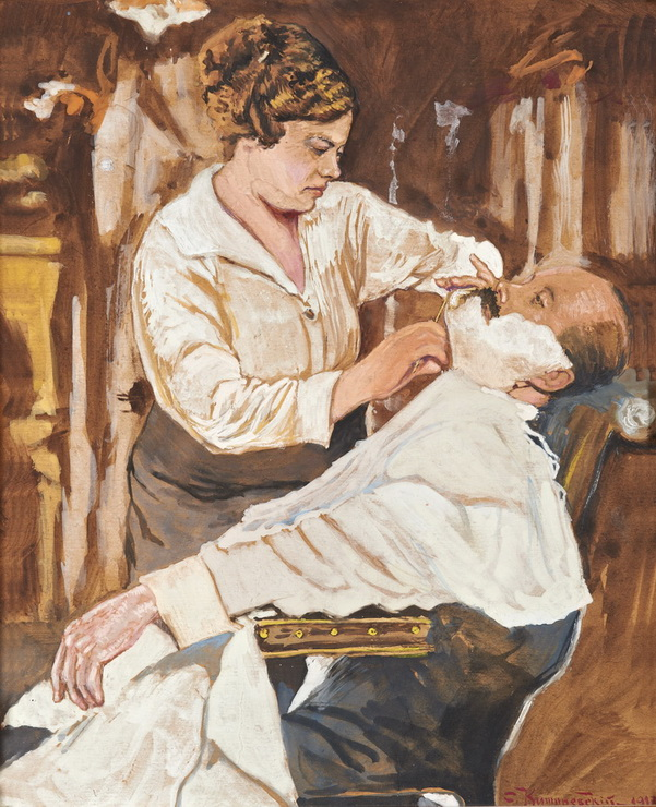 "В парикмахерской". Картон, смешанная техника, 40 x 33 см.